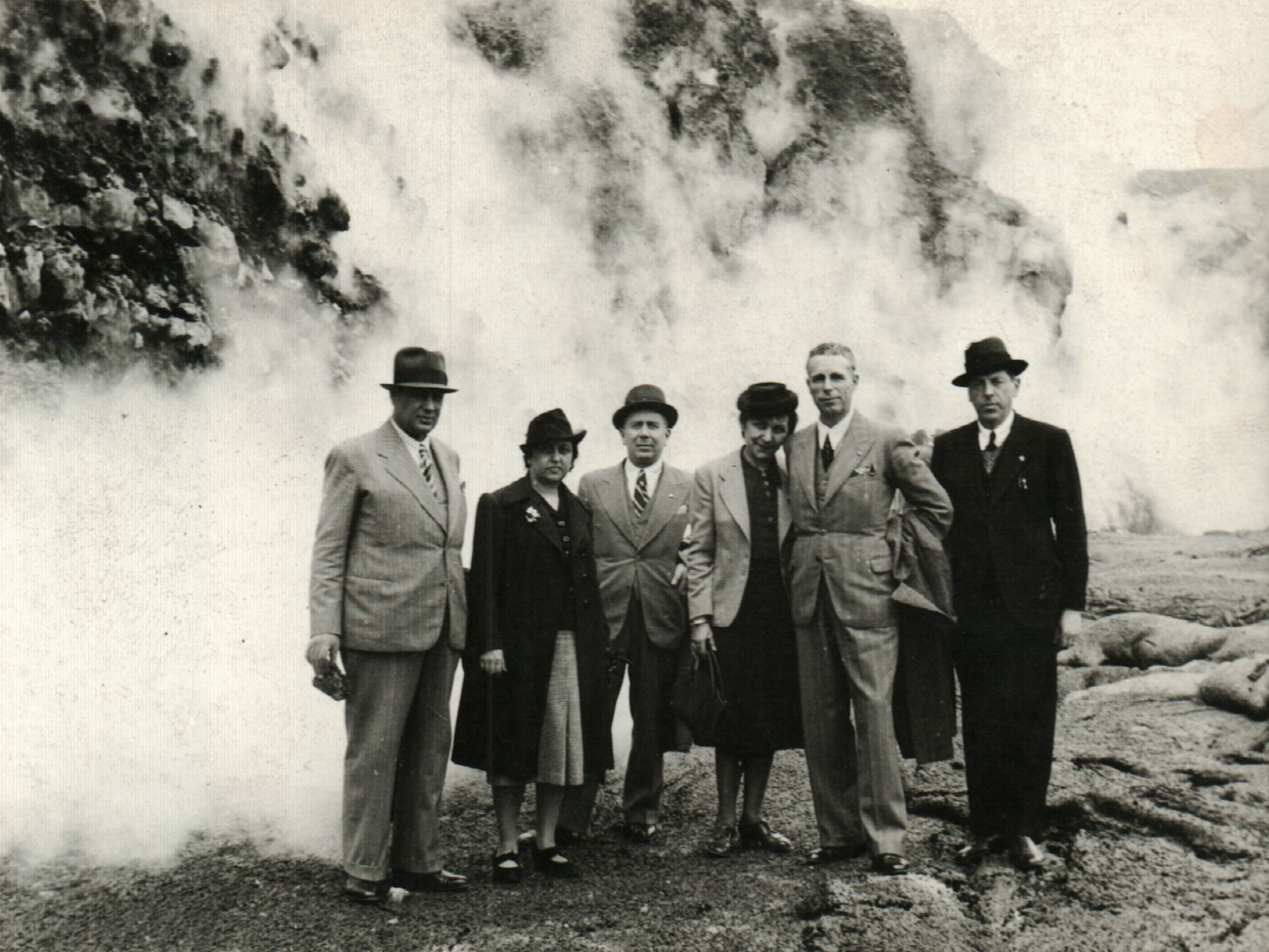 Групова снимка на инж. Стоян Митов в Италия.